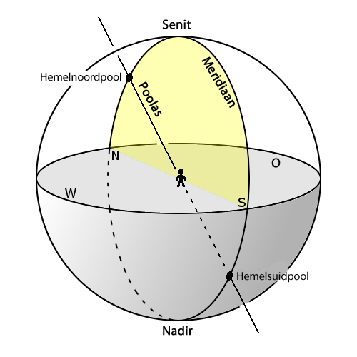 Die meridiaan aan die hemelbol. ’n Waarnemer se "boonste meridiaan", ’n halfsirkel, loop deur hulle senit en die noord- en suidpunt van hul horison (die geel deel op die illustrasie); die waarnemer se "plaaslike meridiaan" is die halfsirkel wat sy senit en albei hemelpole bevat.